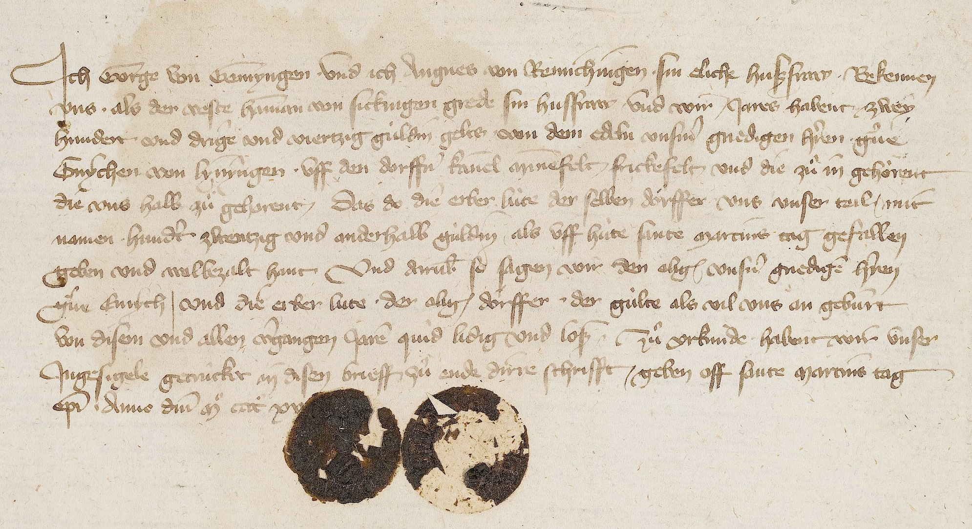 Georg von Gemmingen und seine Ehefrau Agnes von Remchingen bescheinigen dem Grafen Emich VII. von Leiningen-Hardenburg den Empfang der Hälfte des anfallenden Jahreszinses der Dörfer Kandel, Minfeld und Freckenfeld, der jährlich am Martinstag fälig ist. Ausstelldatum: 11. November 1415 („off sante Martins tag episcopi ∙ Anno domini Mo cccco xv“)